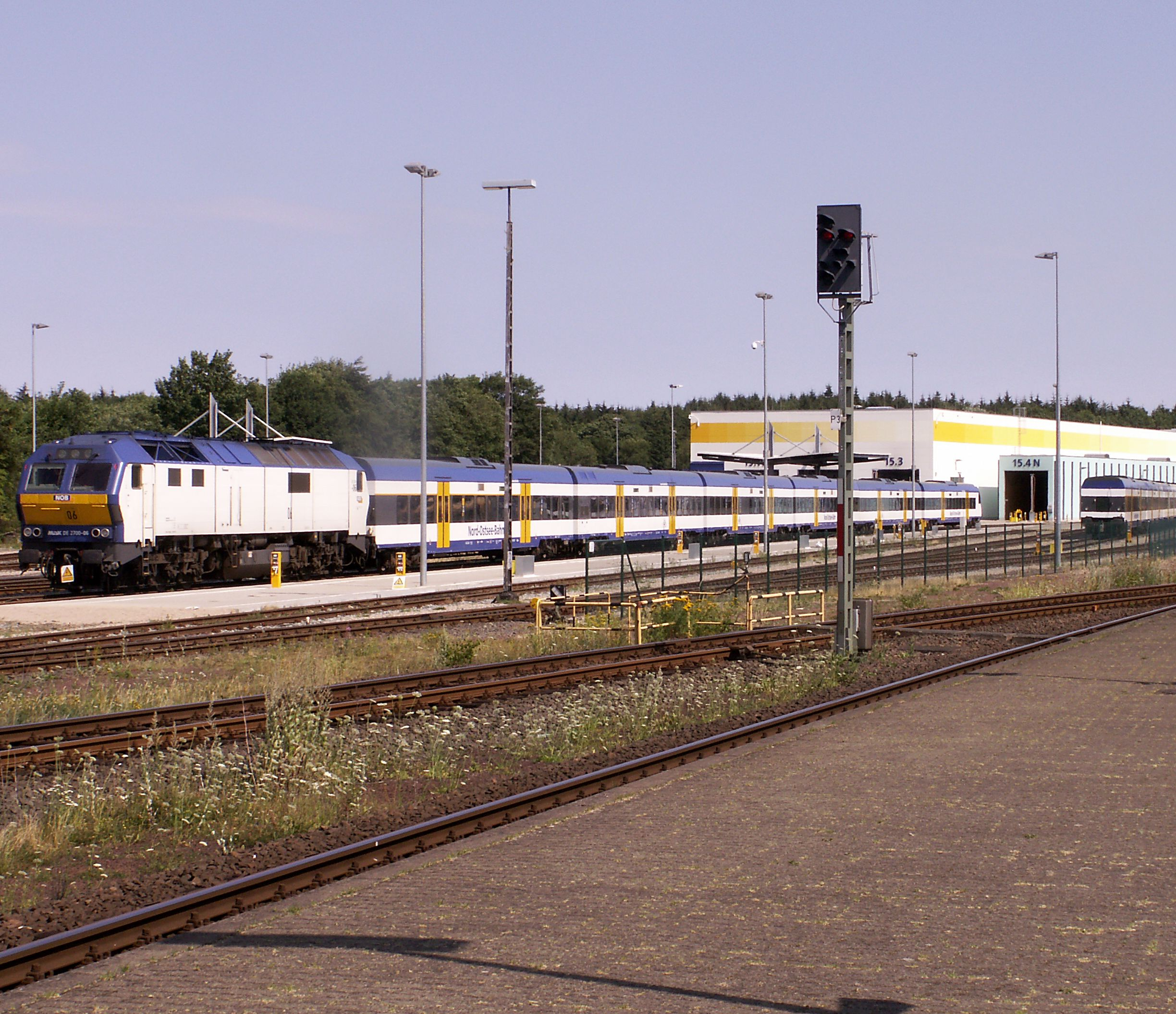 Bf Husum